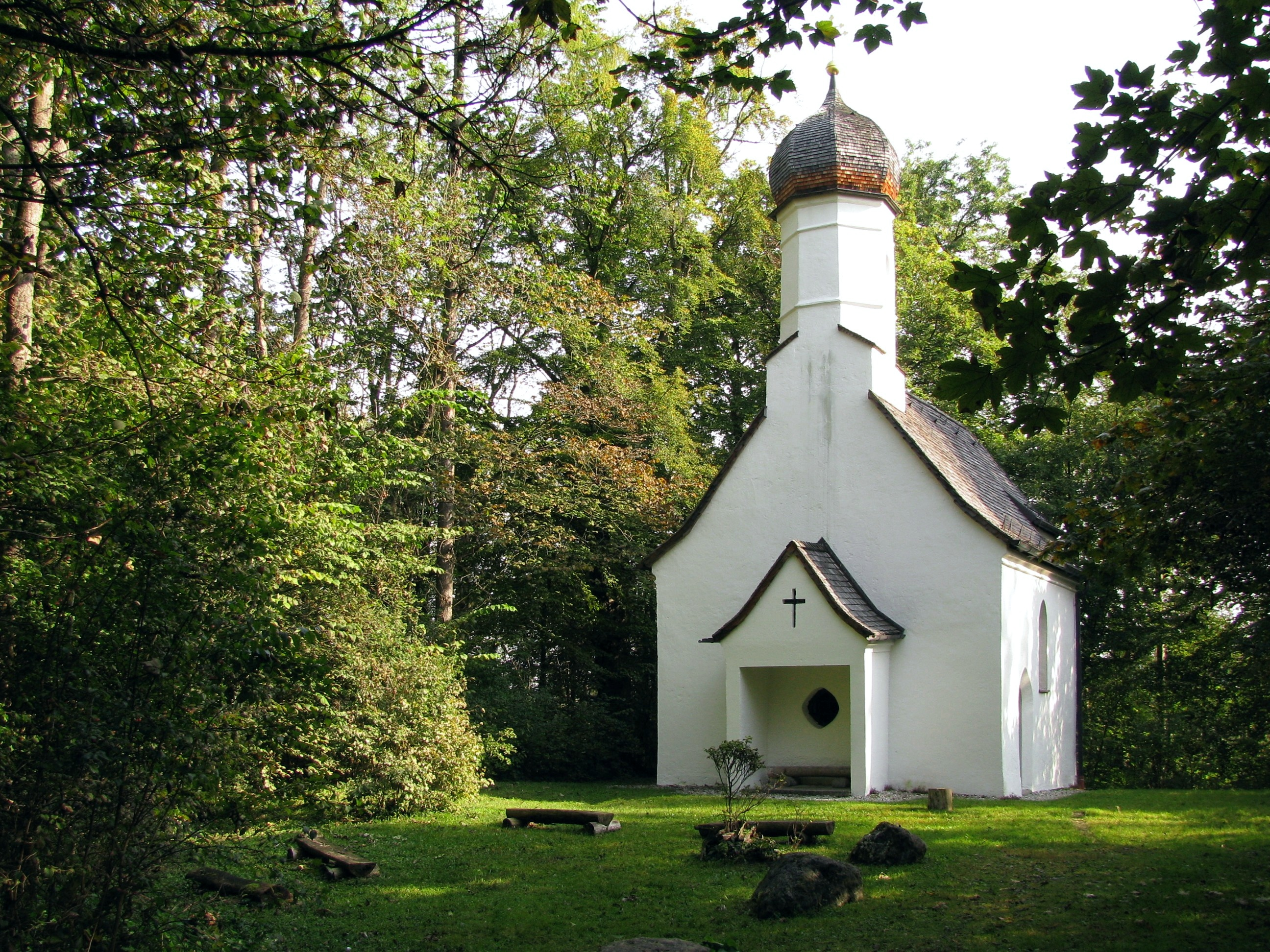 Kath. Filialkirche St. Ulrich, Westseite This is a photograph of an architectural monument.